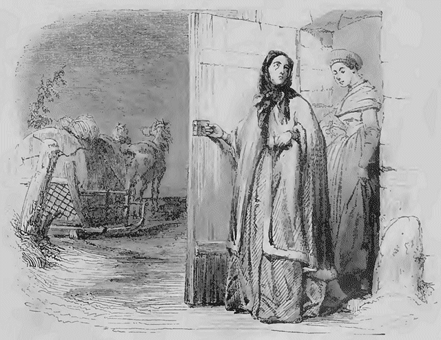 Illustration pour "Le Tourbillon de Neige". Travail d'un artiste anonyme, publié en 1843.